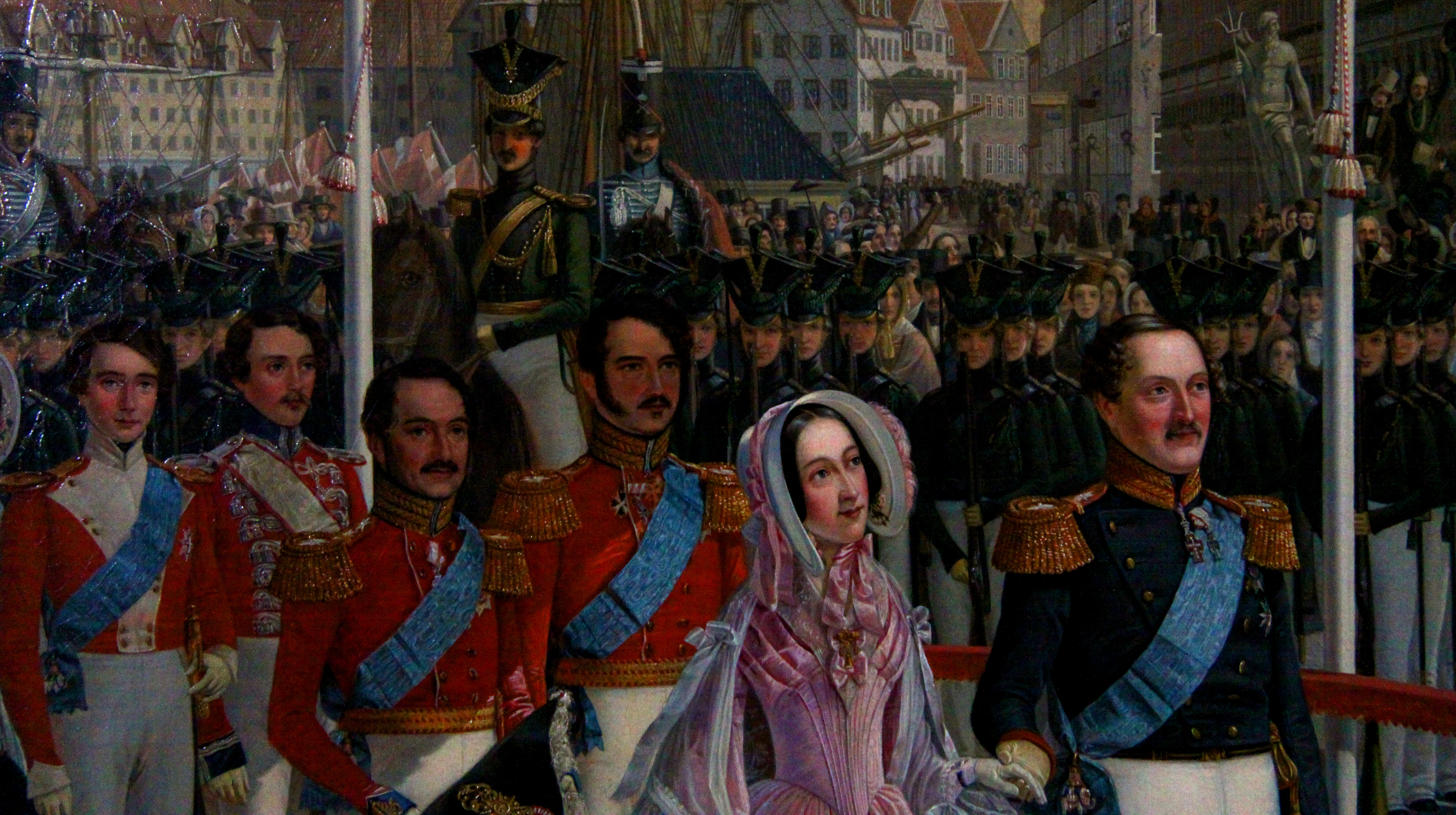 København / Copenhagen. I Rosenborg Slot.